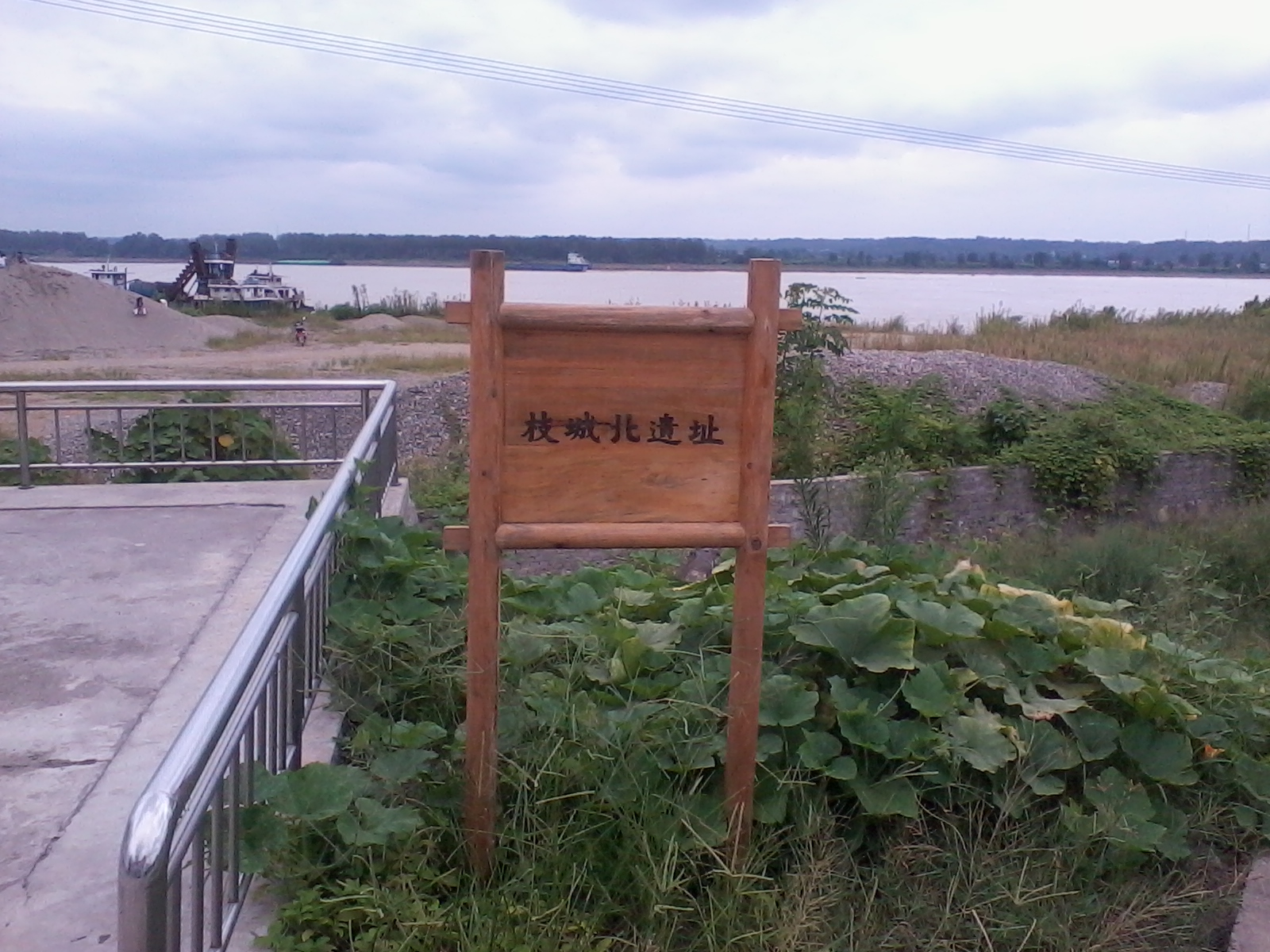 中国，湖北省宜都市枝城镇枝城北人类文化遗址照片。